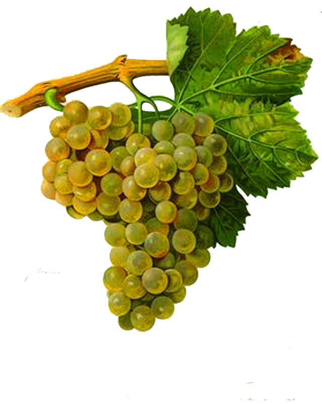 Grappe de Maccabeo blanc par Viala et Vermorel